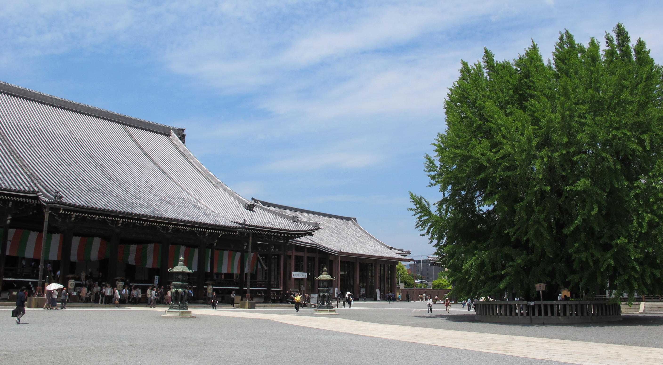 Kyoto, nishi-hoganji